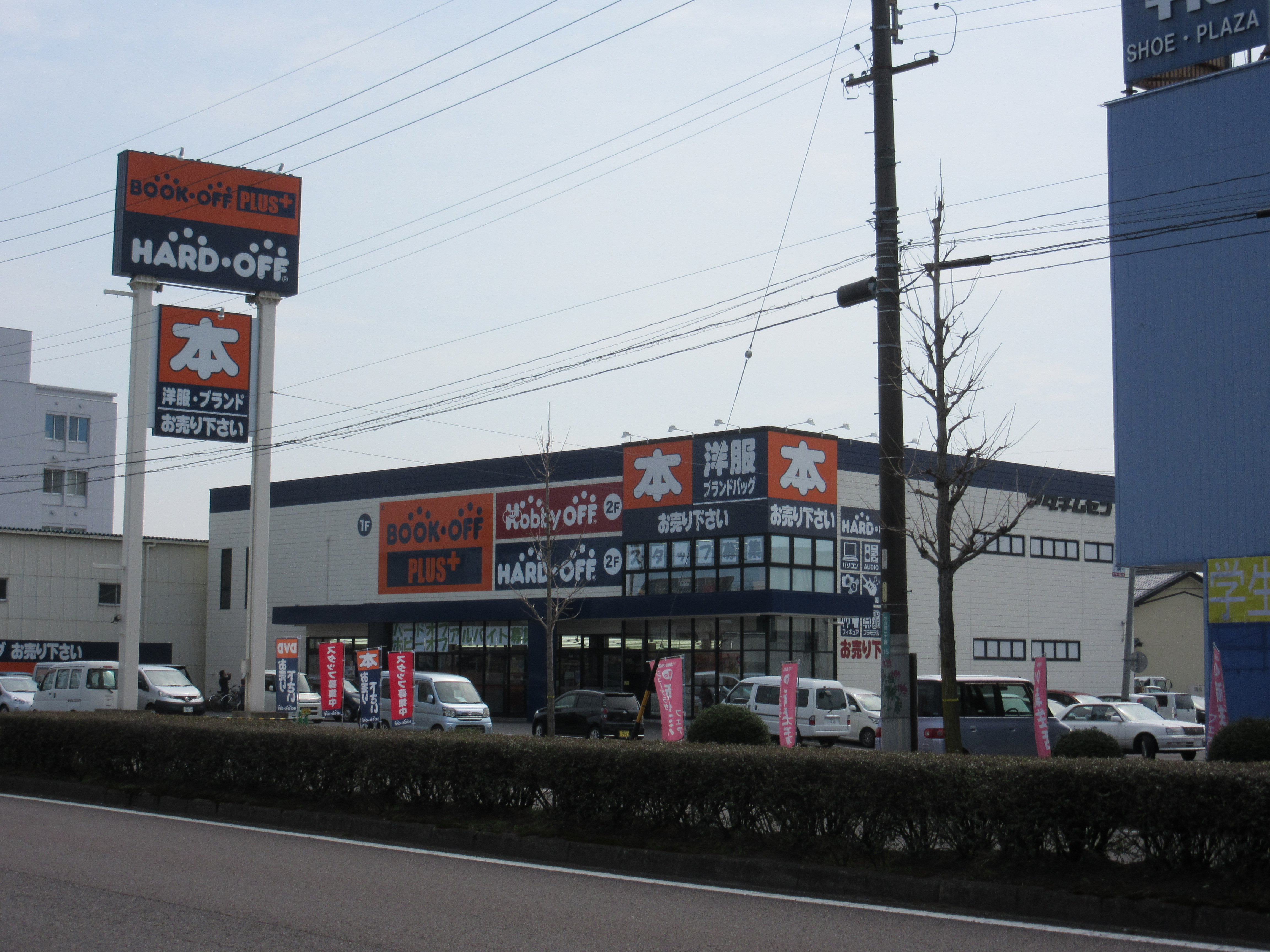 ブックオフ岐阜宇佐店